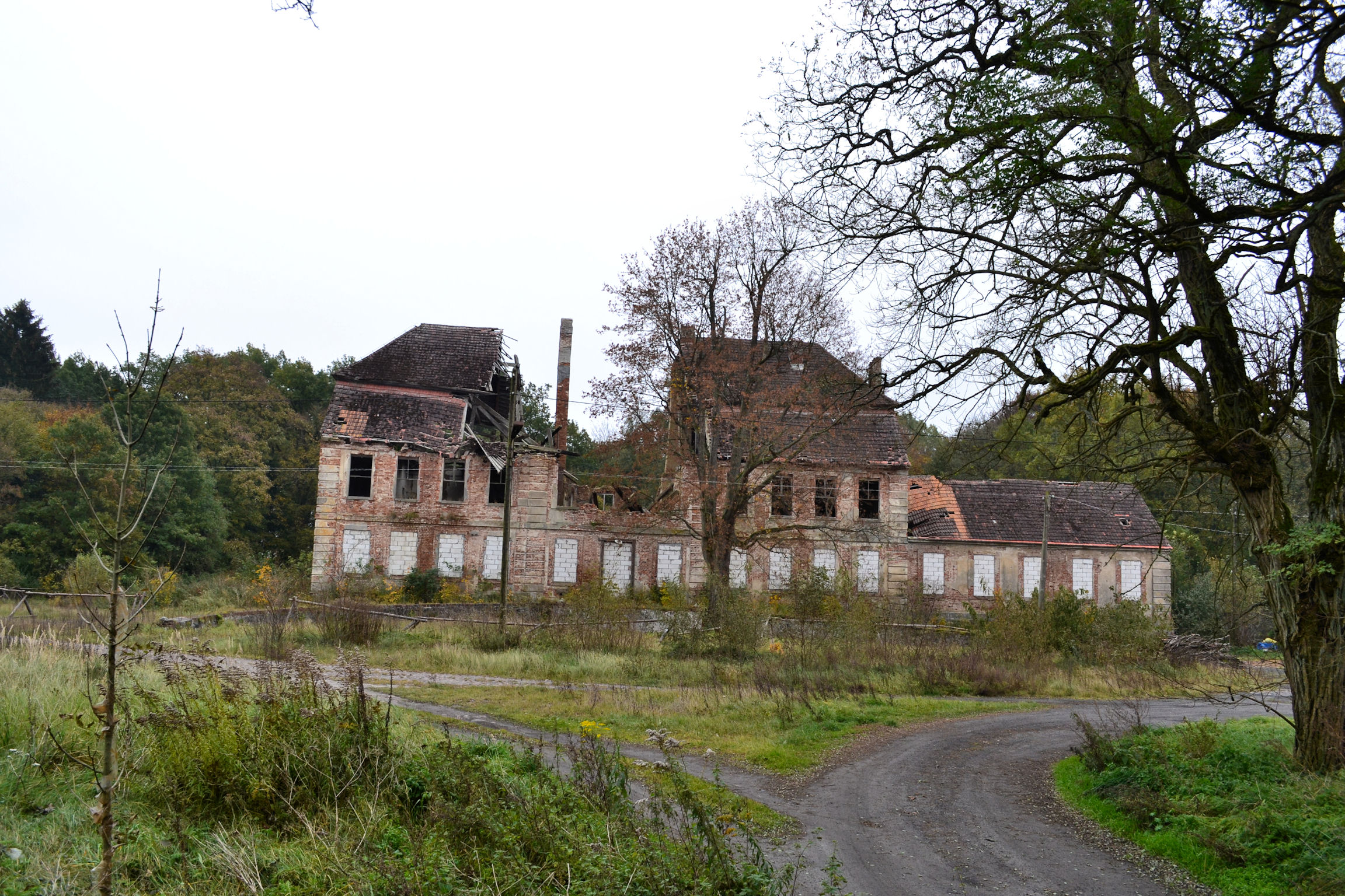 Ruiny pałacu w Łoźnicy (woj. zachodniopomorskie)